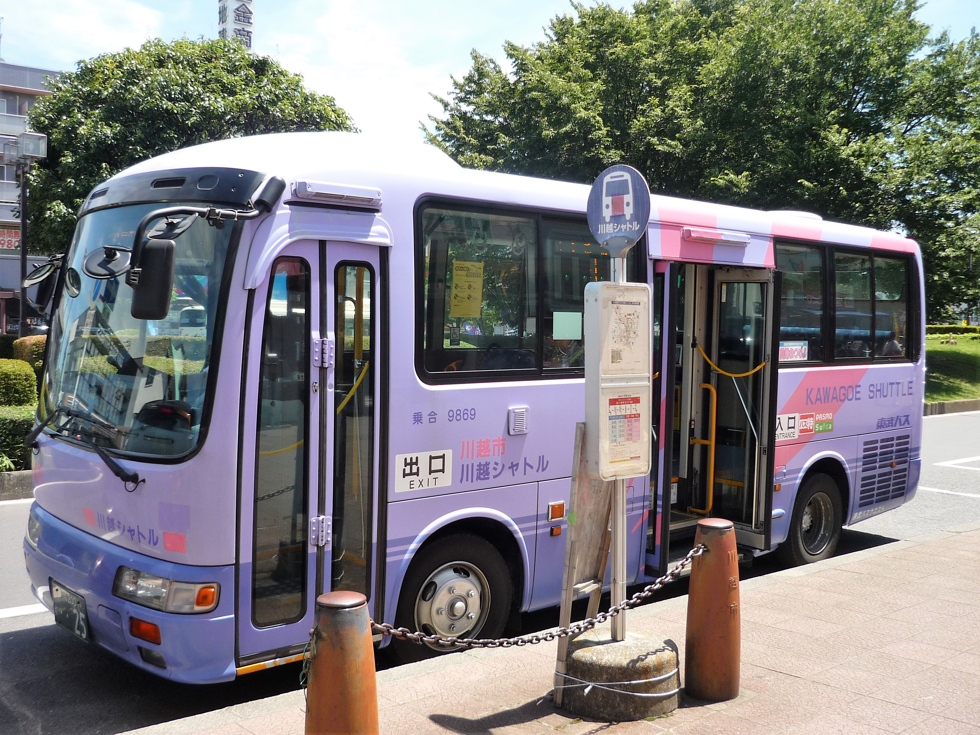 鶴ヶ島駅西口に停車中の川越シャトル